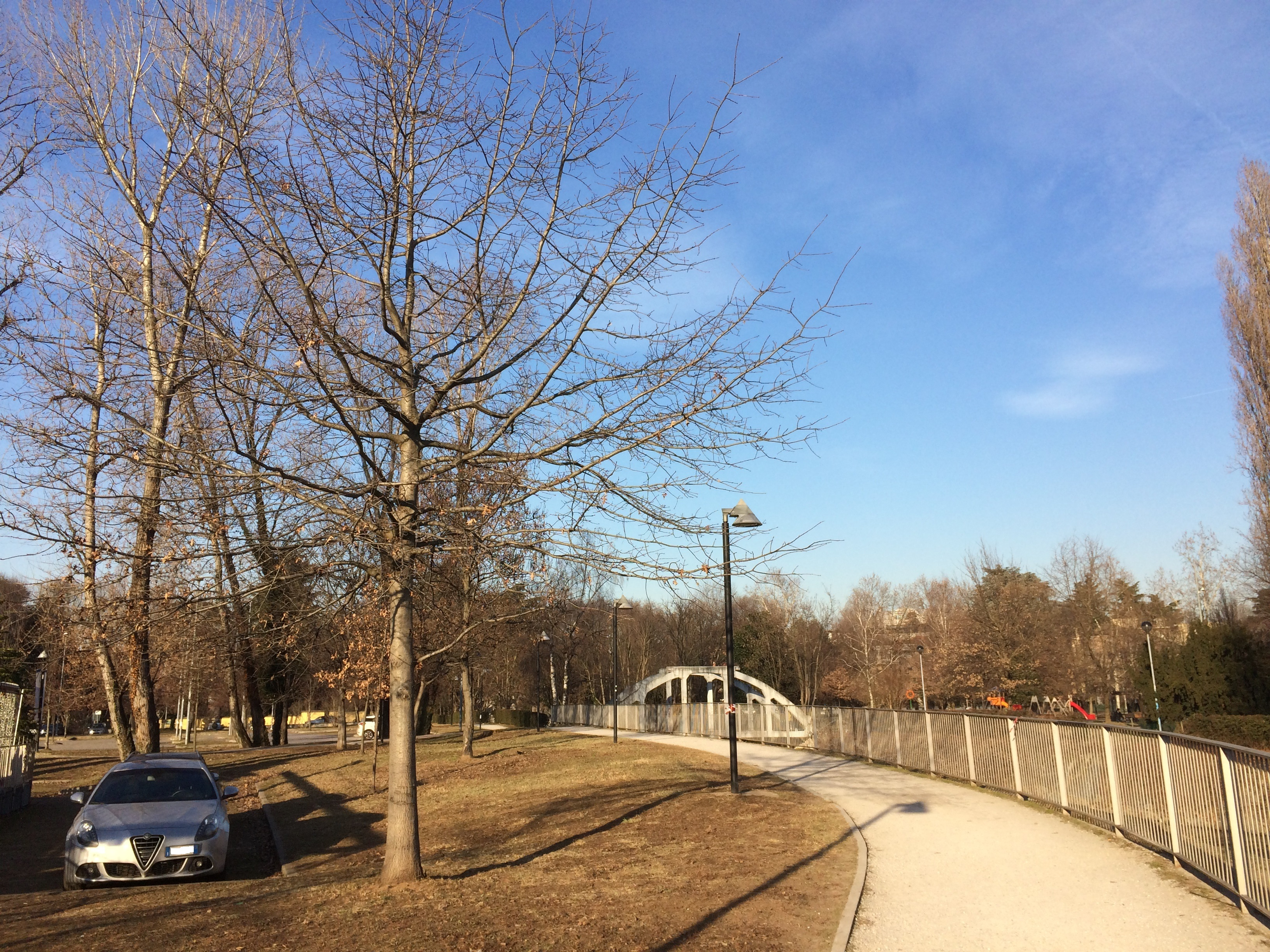 Giardini di via Diaz, Legnano